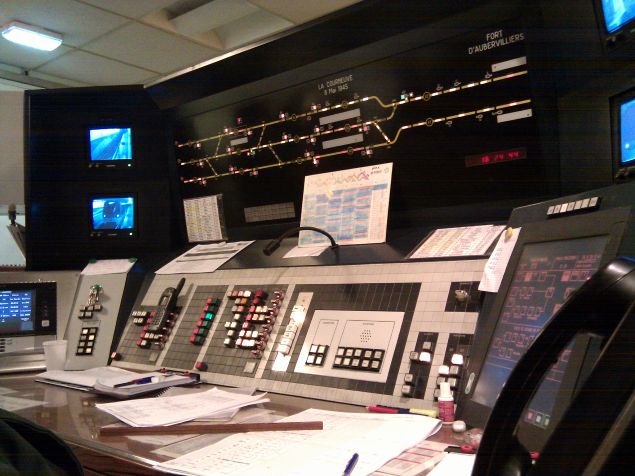 Poste de manoeuvre local de la Courneuve.